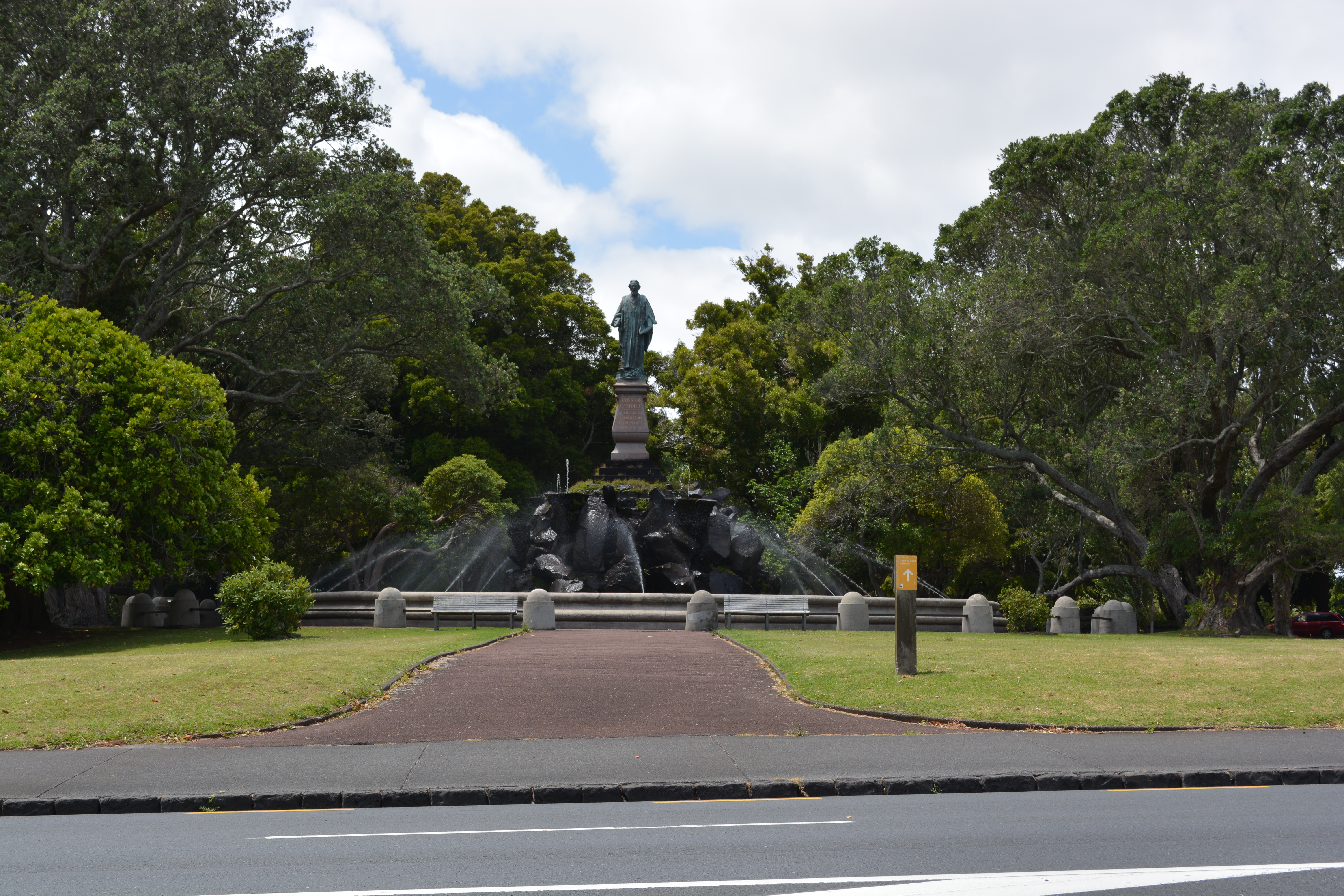 Epsom,Auckland.New Zealand